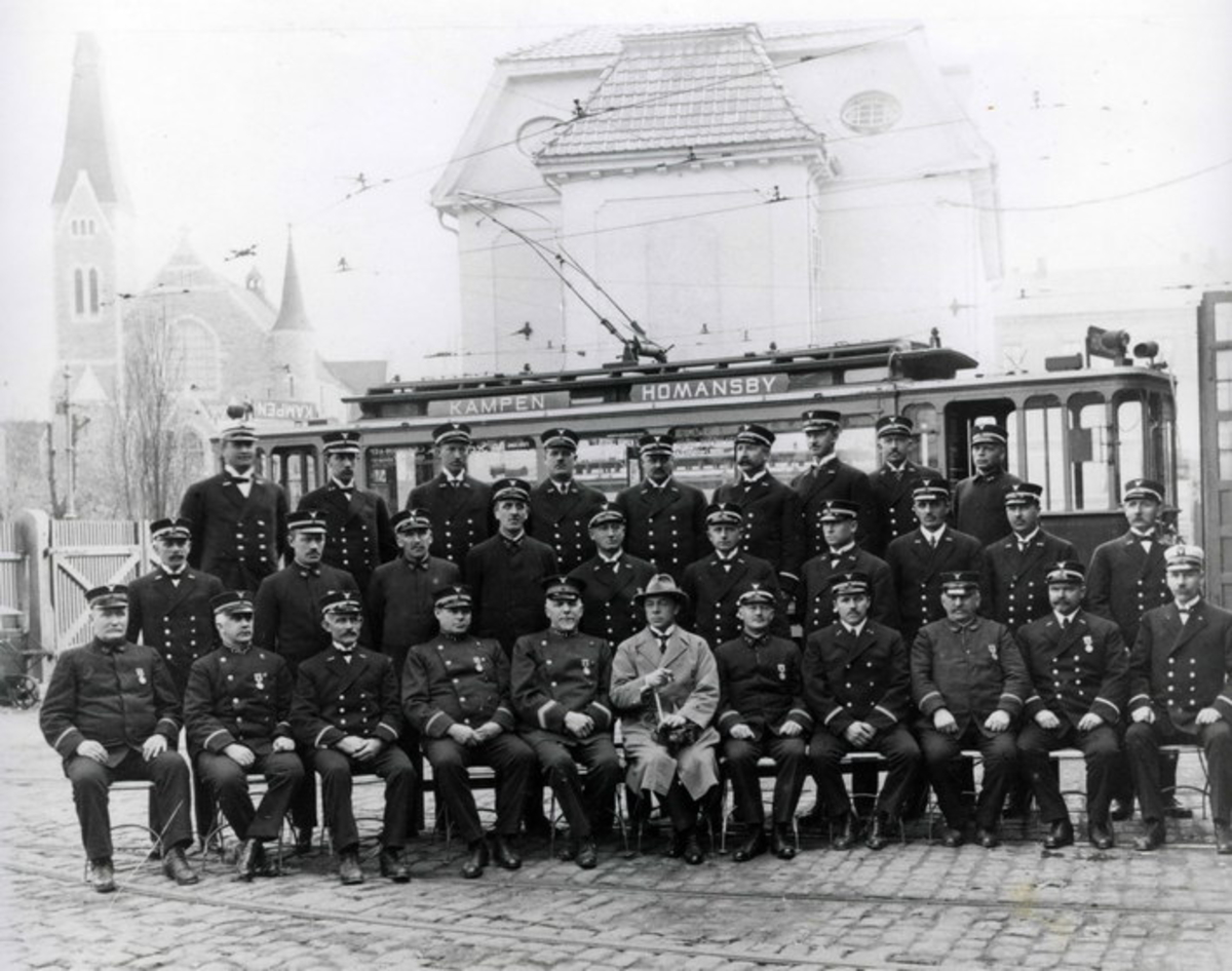 Konduktører og trikkeførere til Kristiania Sporveisselskap (Grønntrikken), bak trikkestallen i Sporveisgata 8